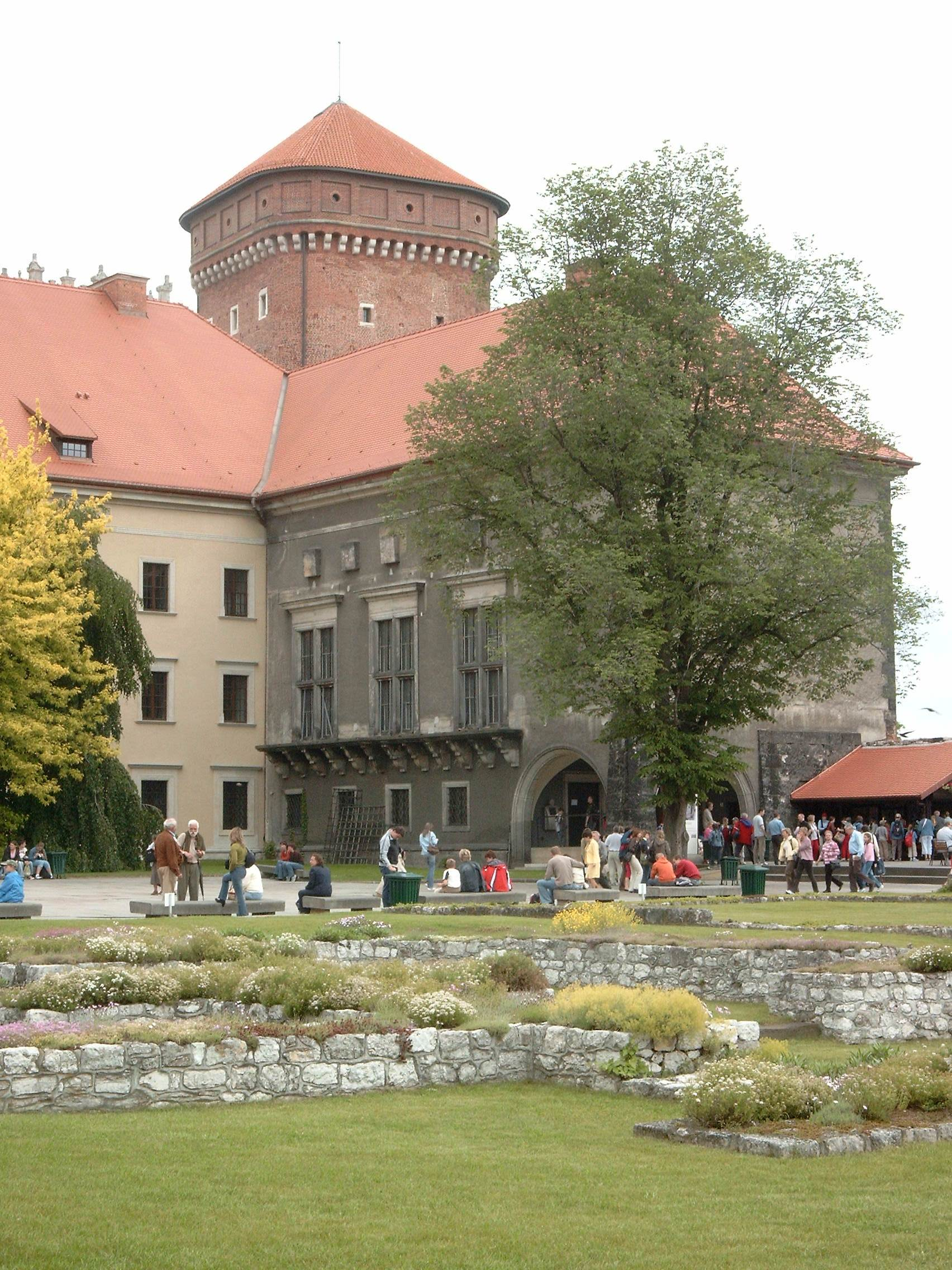 Budynek, w którym mieści się wystawa Wawel Zaginiony oraz baszta Senatorska